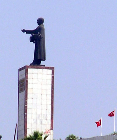 један од два споменика Ататурку, изнад града на брду, ка тзв. Женској плажи; Кушадаси / Ајдин, Турска